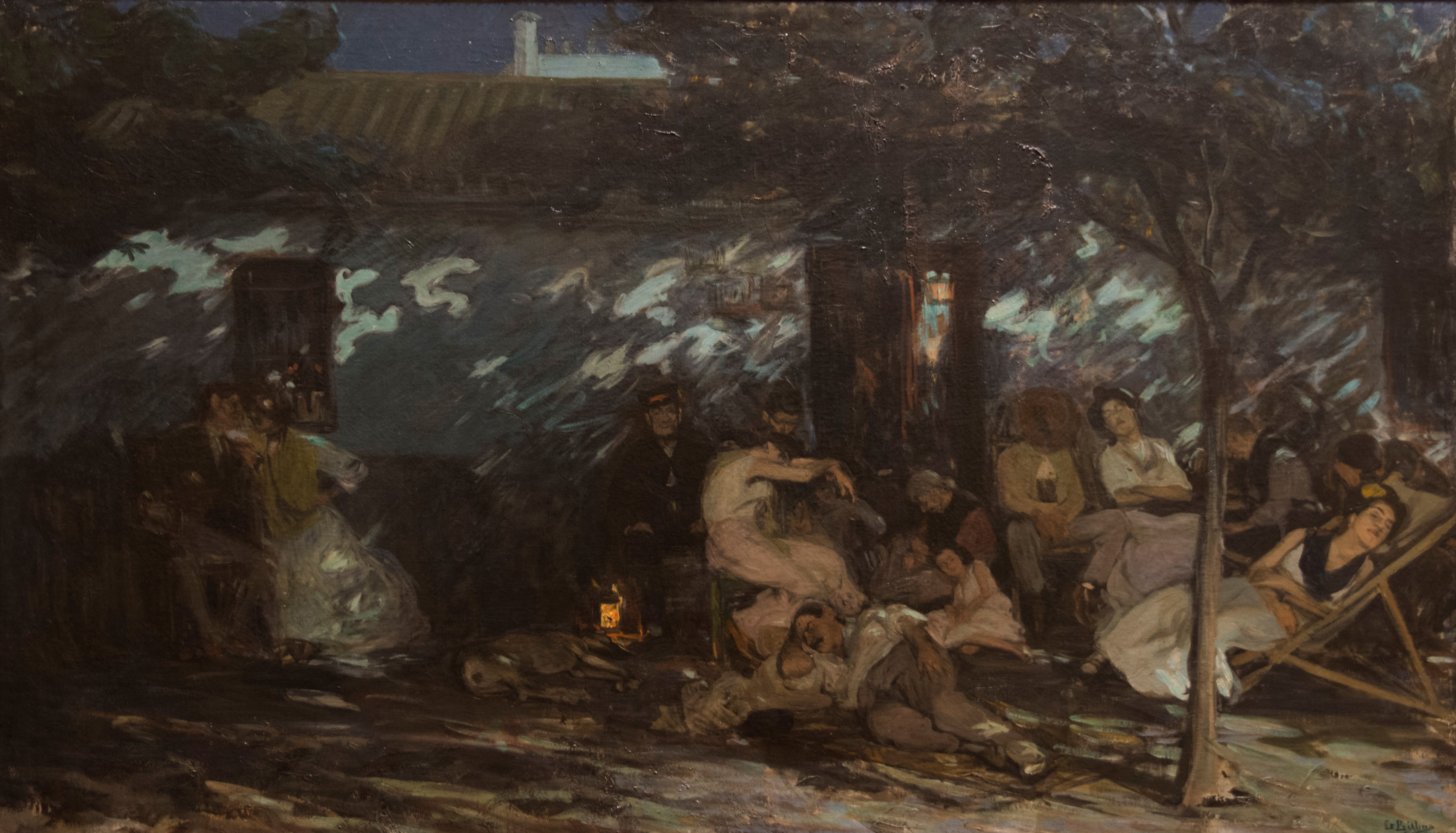 Noche de verano en Sevilla (1905). Autor: Gonzalo Bilbao. Museo de Bella Artes de Sevilla